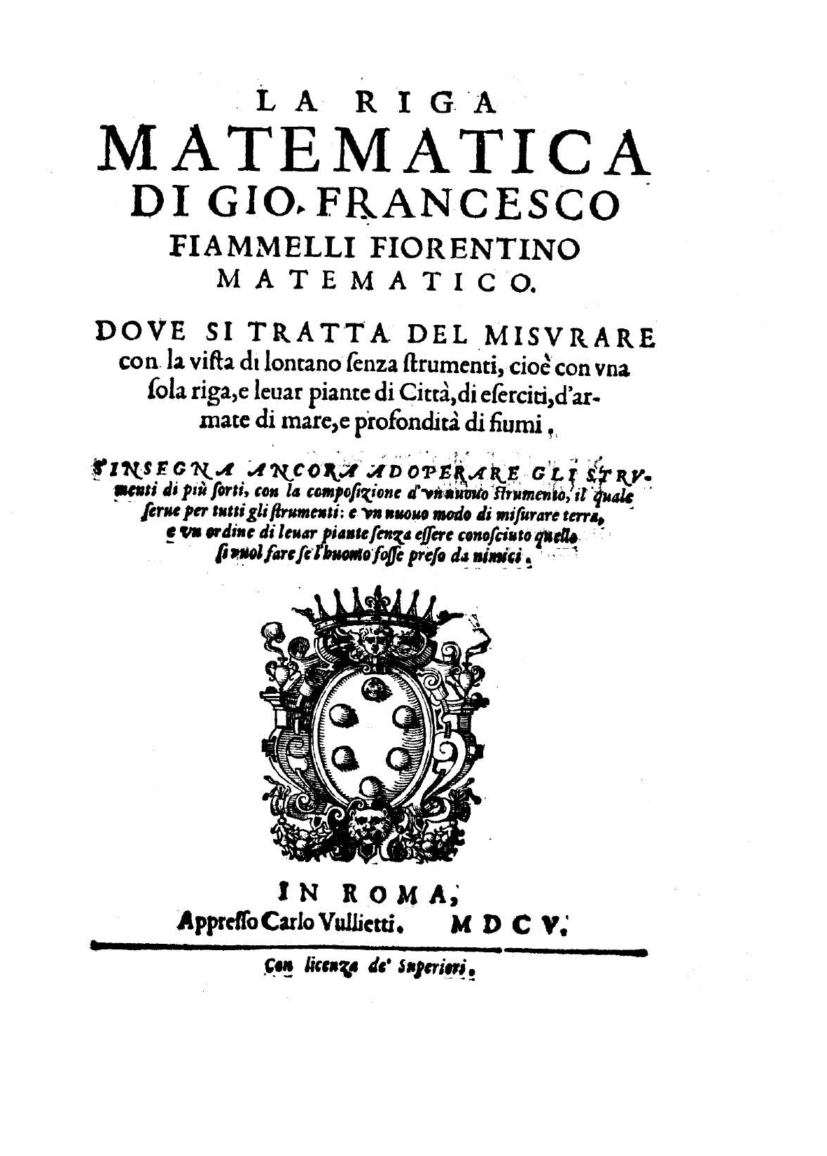 La riga matematica di Gio. Francesco Fiammelli fiorentino matematico. Doue si tratta del misurare con la vista di lontano senza strumenti, cioè con vna sola riga, e leuar piante di città, di eserciti, d'armate di mare, e profondità di fiumi. S'insegna ancora adoperare gli strumenti di più forti, con la composizione d'vn nuouo strumento, il quale serue per tutti gli strumenti: e vn nuouo modo di misurare terra, e vn ordine di leuar piante senza essere conosciuto quello si vuol fare se l'huomo fosse preso da nimici. - In Roma : appresso Carlo Vullietti, 1605. - [16], 103, [13] p. : ill. ; 4º .